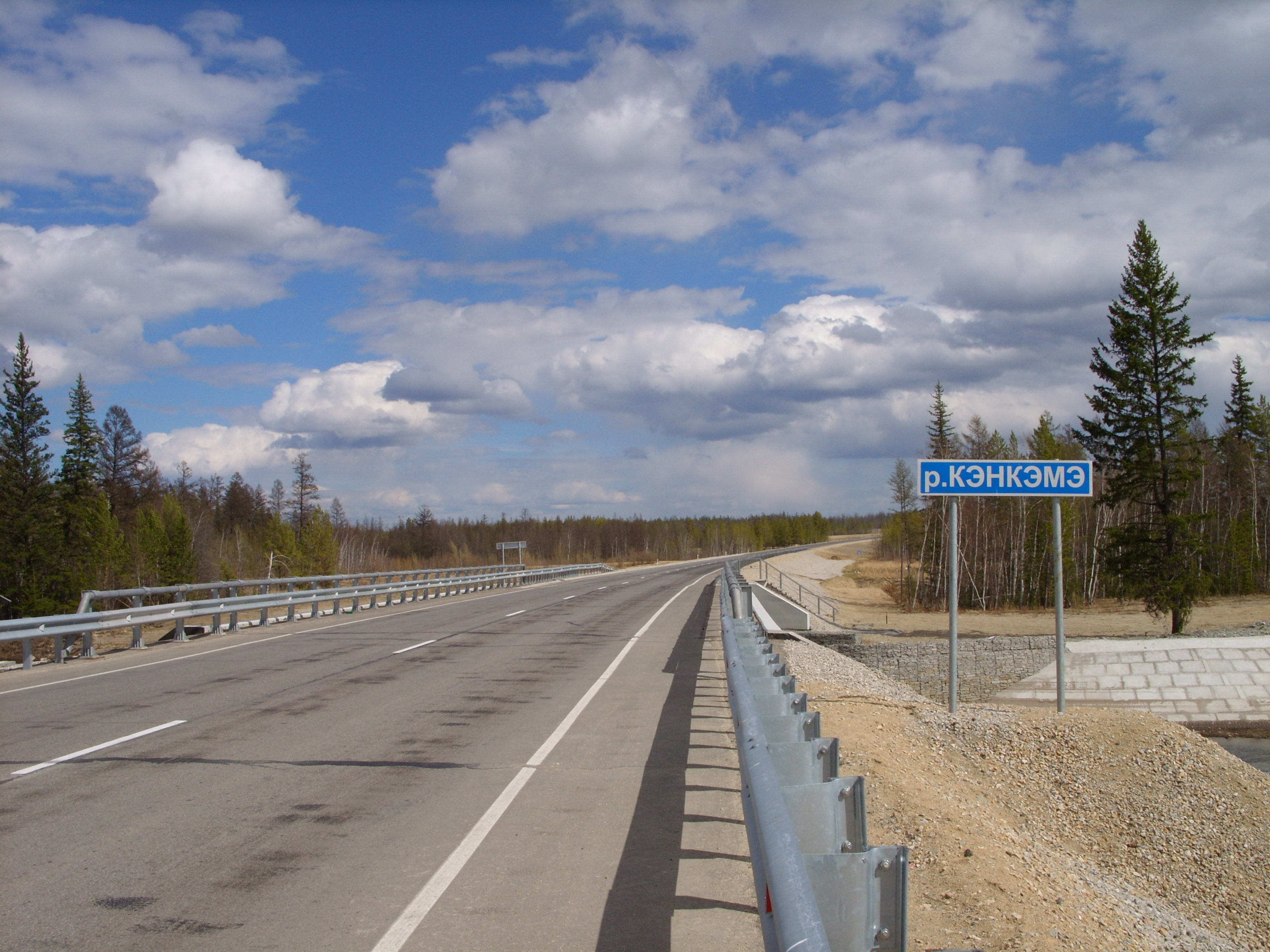 47-й км Вилюйского тракта, городской округ "Якутск"